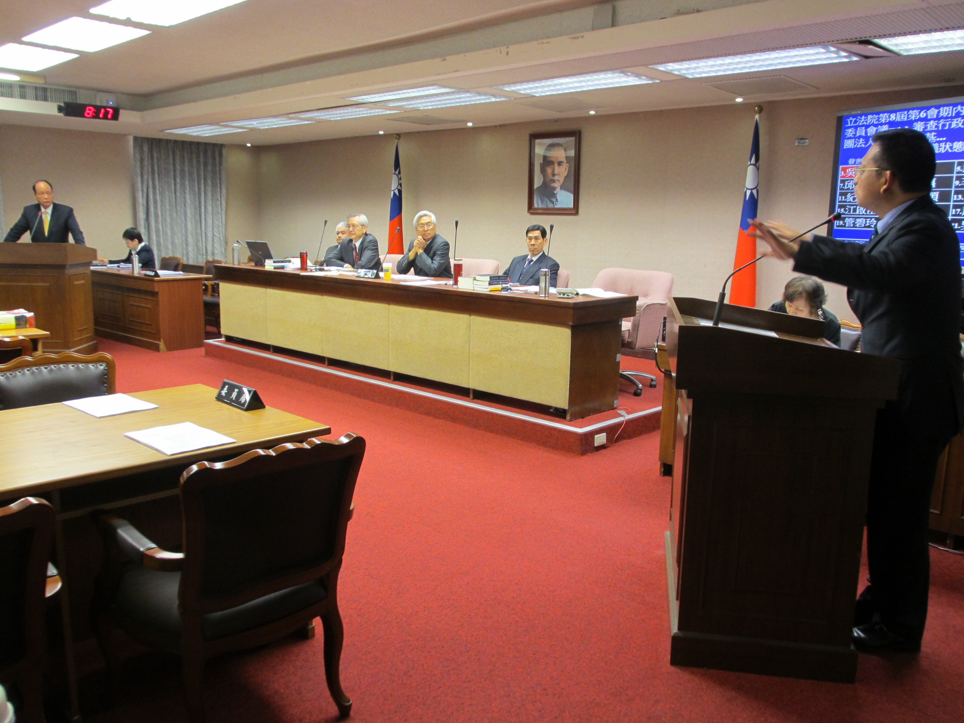 中文（台灣）: 台灣立法院內政委員會10月20號質詢的情形(美國之音張永泰拍攝)